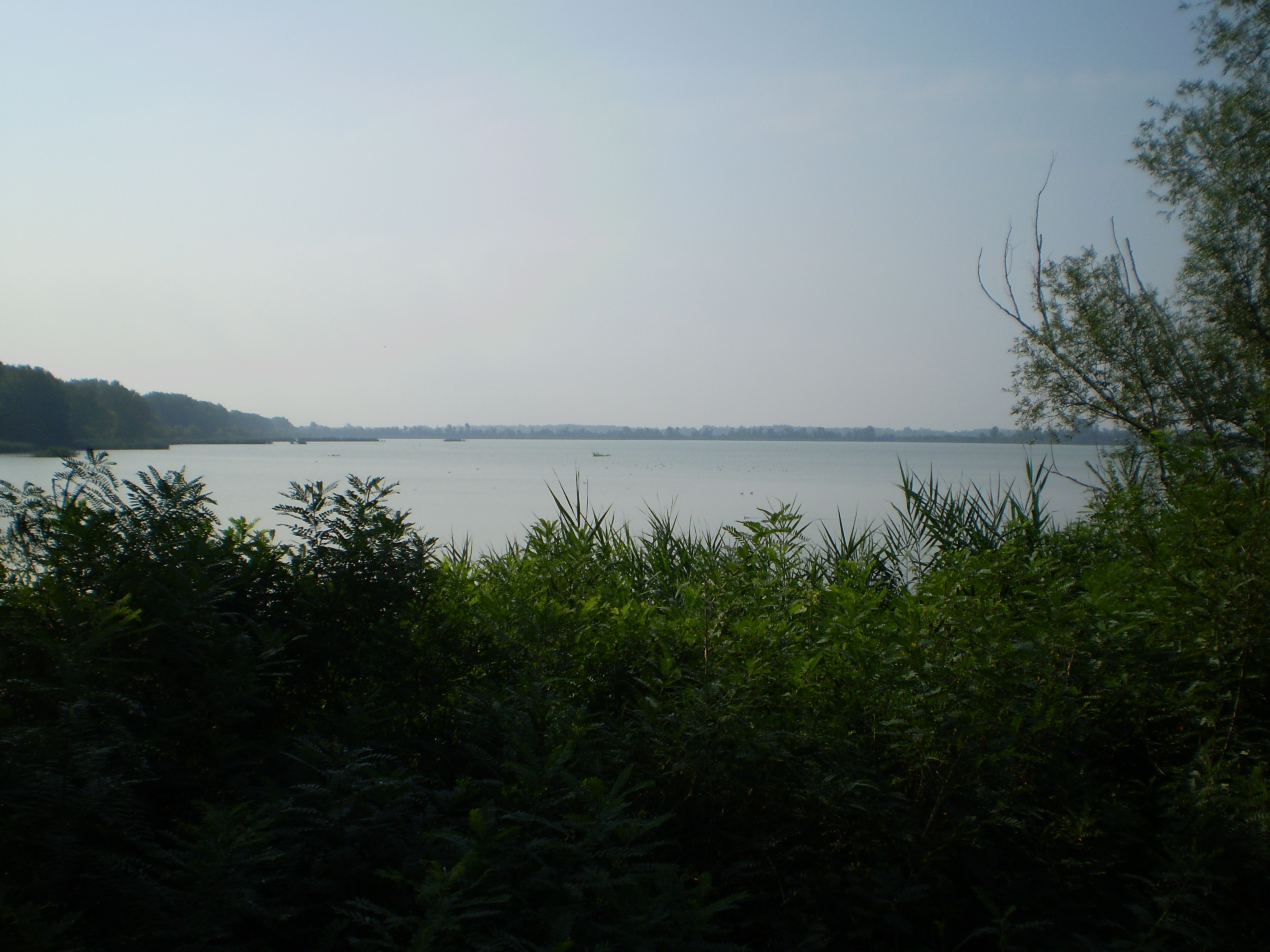 Panoramica su una cassa di espansione delle Valli di Campotto